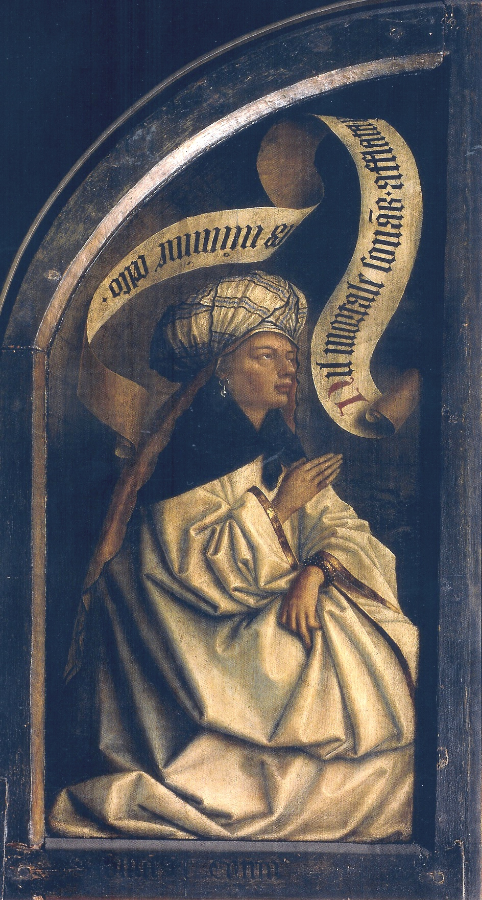 detail: Sybil